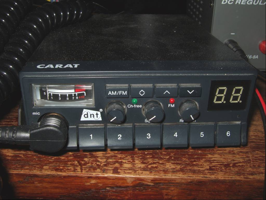 klassisches CB-Mobilfunkgeraet: dnt Carat